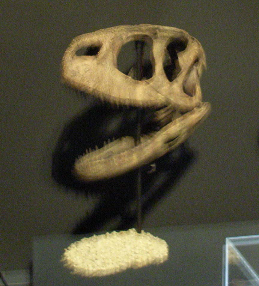 北九州市立 自然史・歴史博物館 いのちのたび博物館